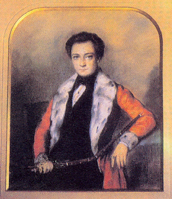 Николай Сергеевич Тургенев, брат писателя